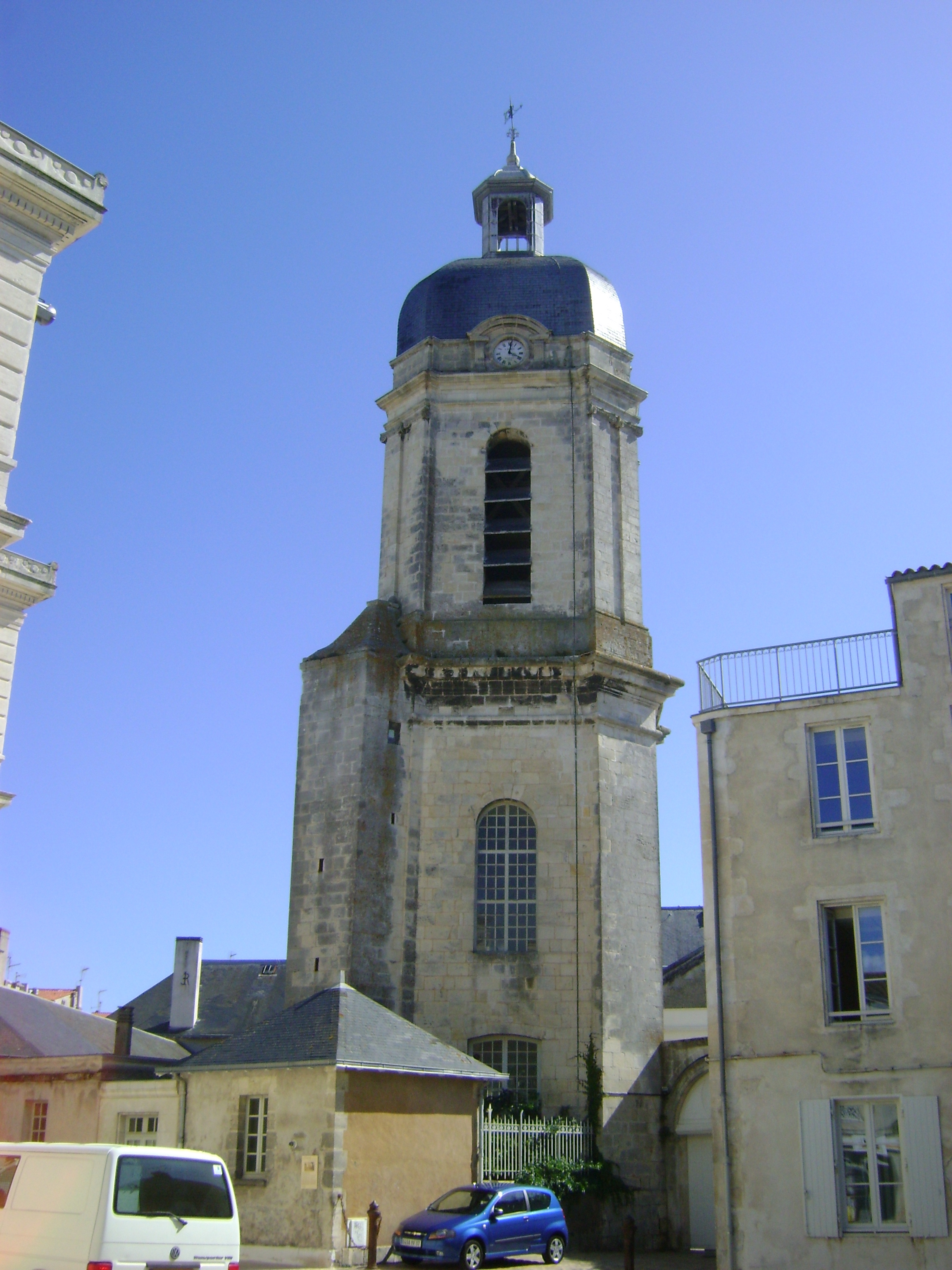 Clocher Saint-Jean de la Rochelle. Reste de l'église Saint-Jean démolie en 1887.